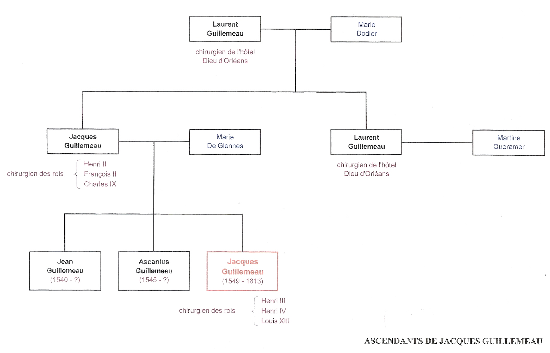 La fratrie Guillemeau compte, outre Jacques, deux frères : un Jean, dont on ne retrouve pas de trace dans l'histoire locale et d'un Ascanius qui fut "machang appothicaire et espicier bourgeois de Paris"